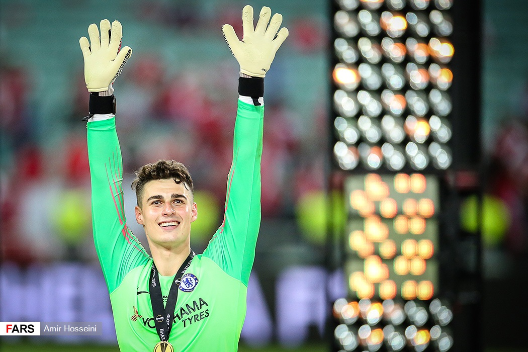 مسابقه چلسی و آرسنال، فینال لیگ اروپا ۲۰۱۹